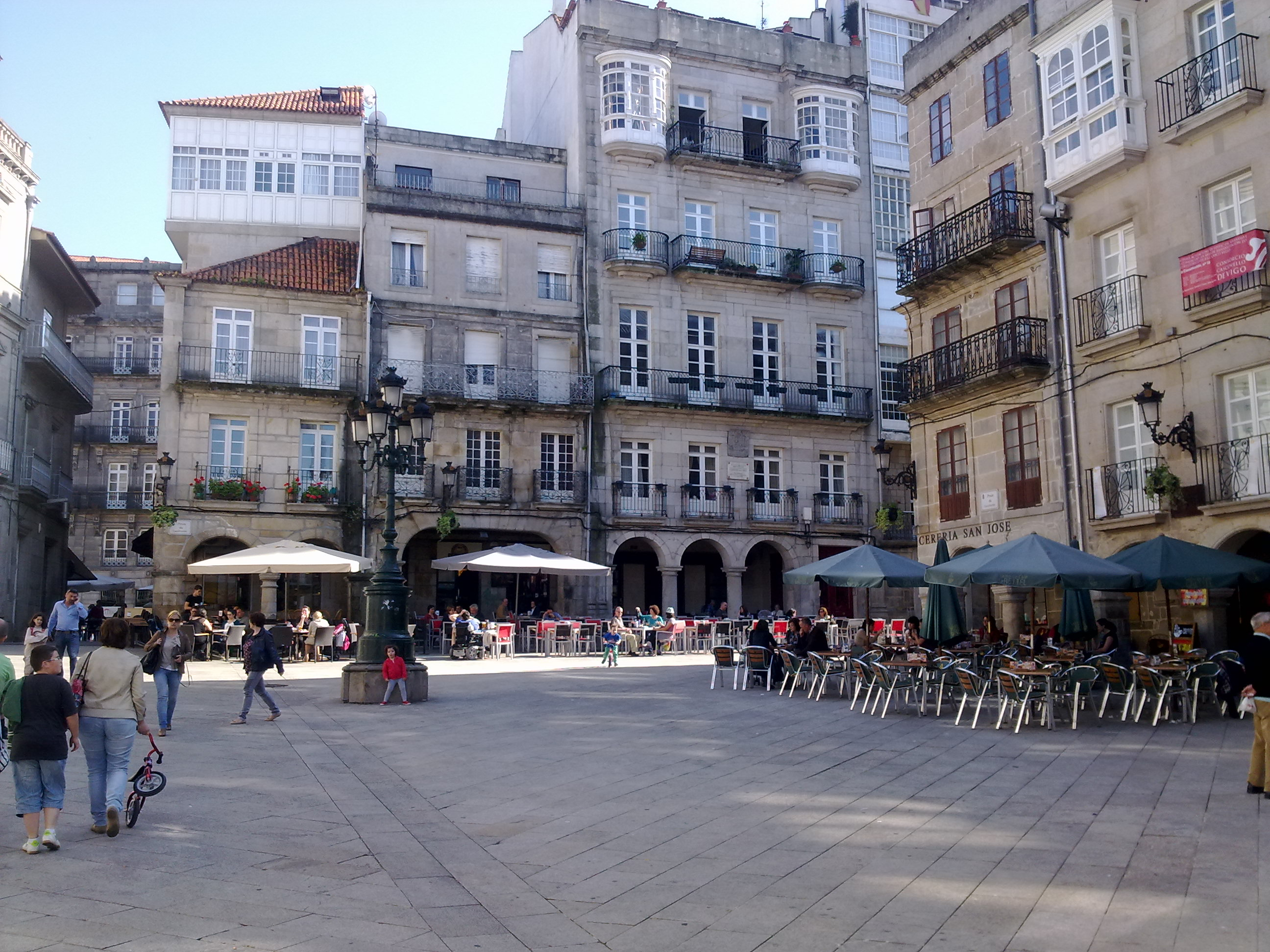 Plaza de la constitución, perteneciente al casco histórico de vigo. La foto ha sido sacada dese la parte de abajo. En esta plaza hai numerosas terrazas en las que se degustan tapas y platos típicos.